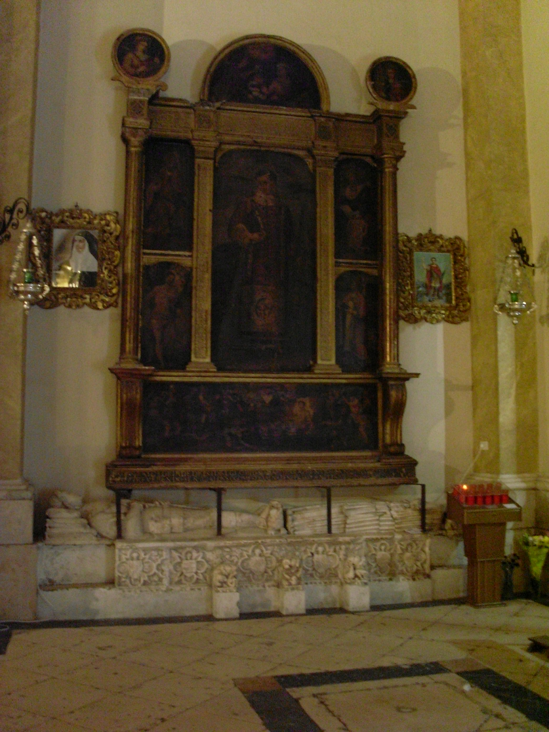 Altar de san Lorenzo de la iglesia de Santa María de Écija. Se encuentra una pintura sobre tabla de san Lorenzo, en el lugar principal; san Sebastián, san Fulgencio, san Pedro y san Pablo, a derecha e izquierda; la Anunciación en el medio punto del remate y las santas Bárbara y Catalina en los tondos, fechado en 1570, sobre un sepulcro en alabastro con esculturas yacentes fechado en el siglo XIV.